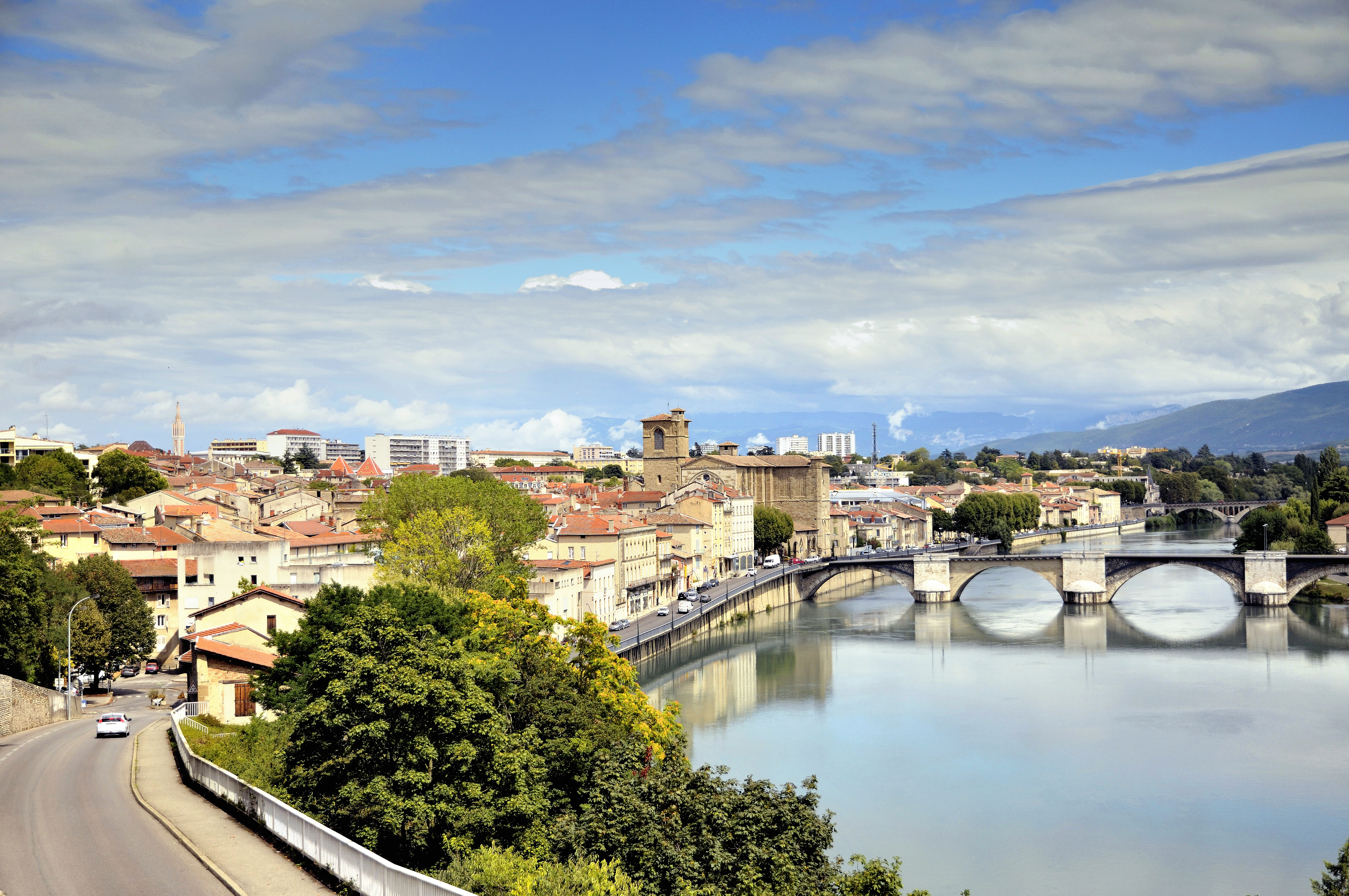 Romans sur Isère